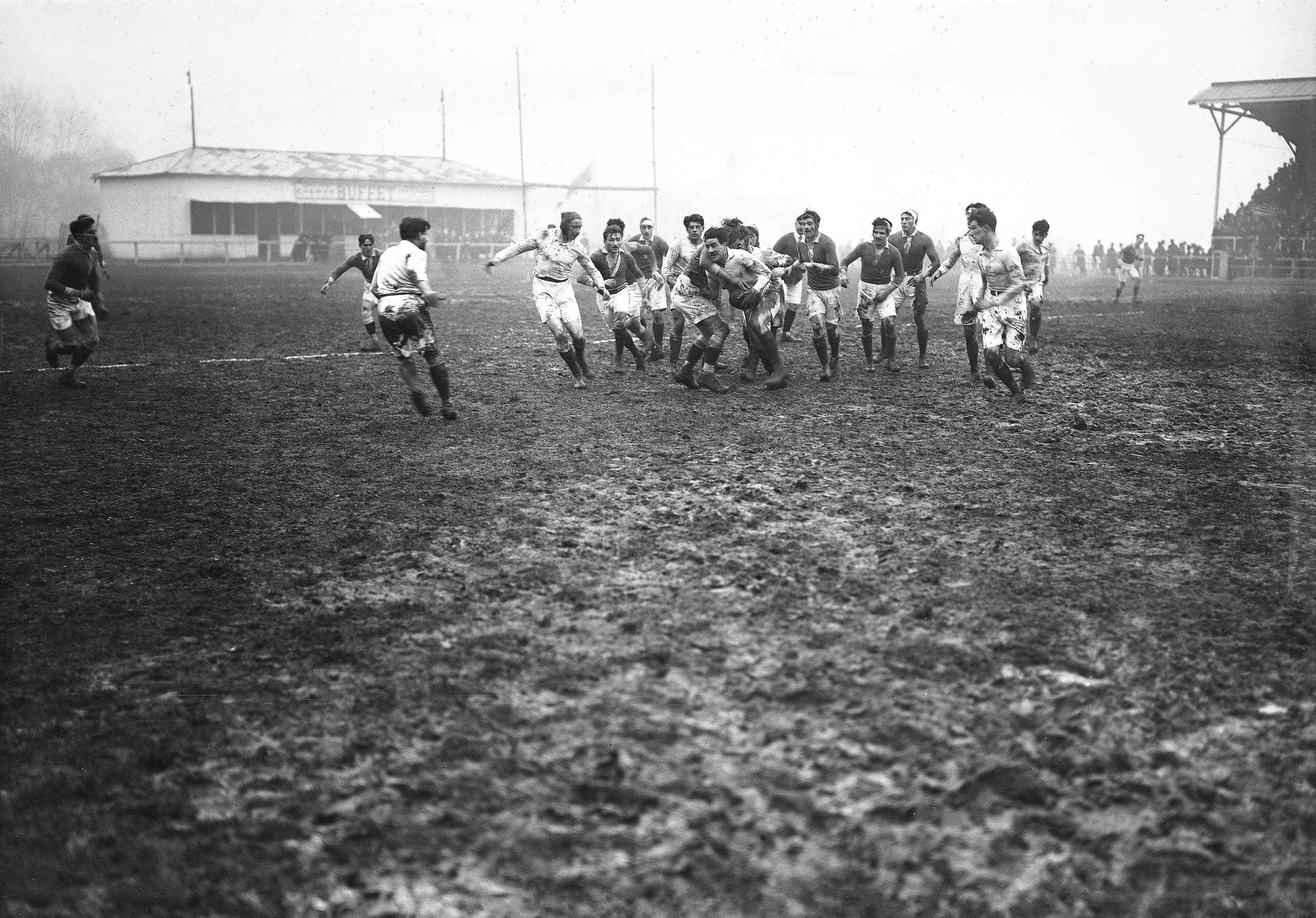 stade Bergeyre, rugby match de l'Olympique de Paris affrontant le R.C.F. (Racing Club de France).